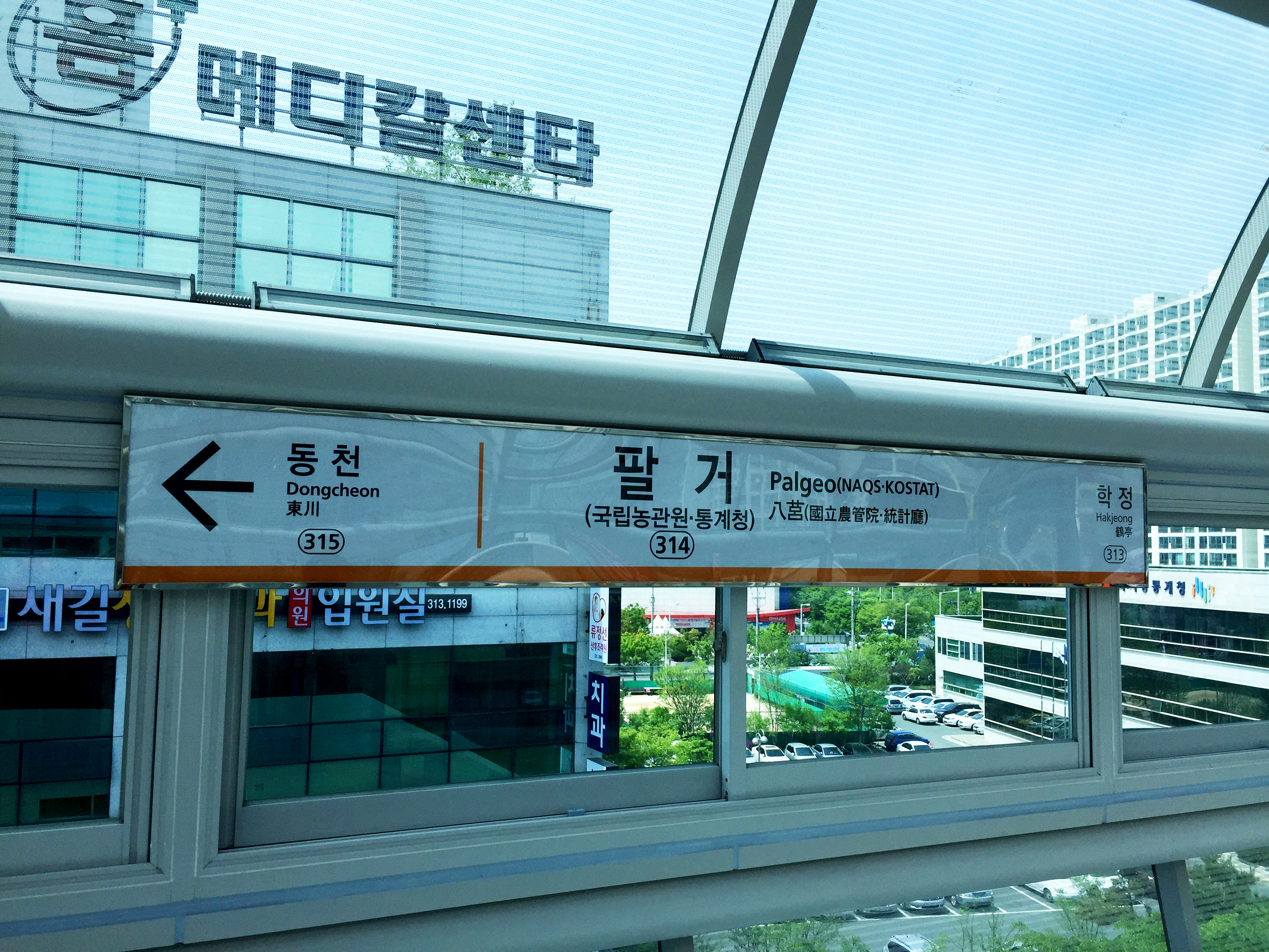 팔거(국립농관원·통계청)역 역명판